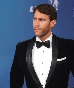 El actor dominicano Carlos de la Mota.